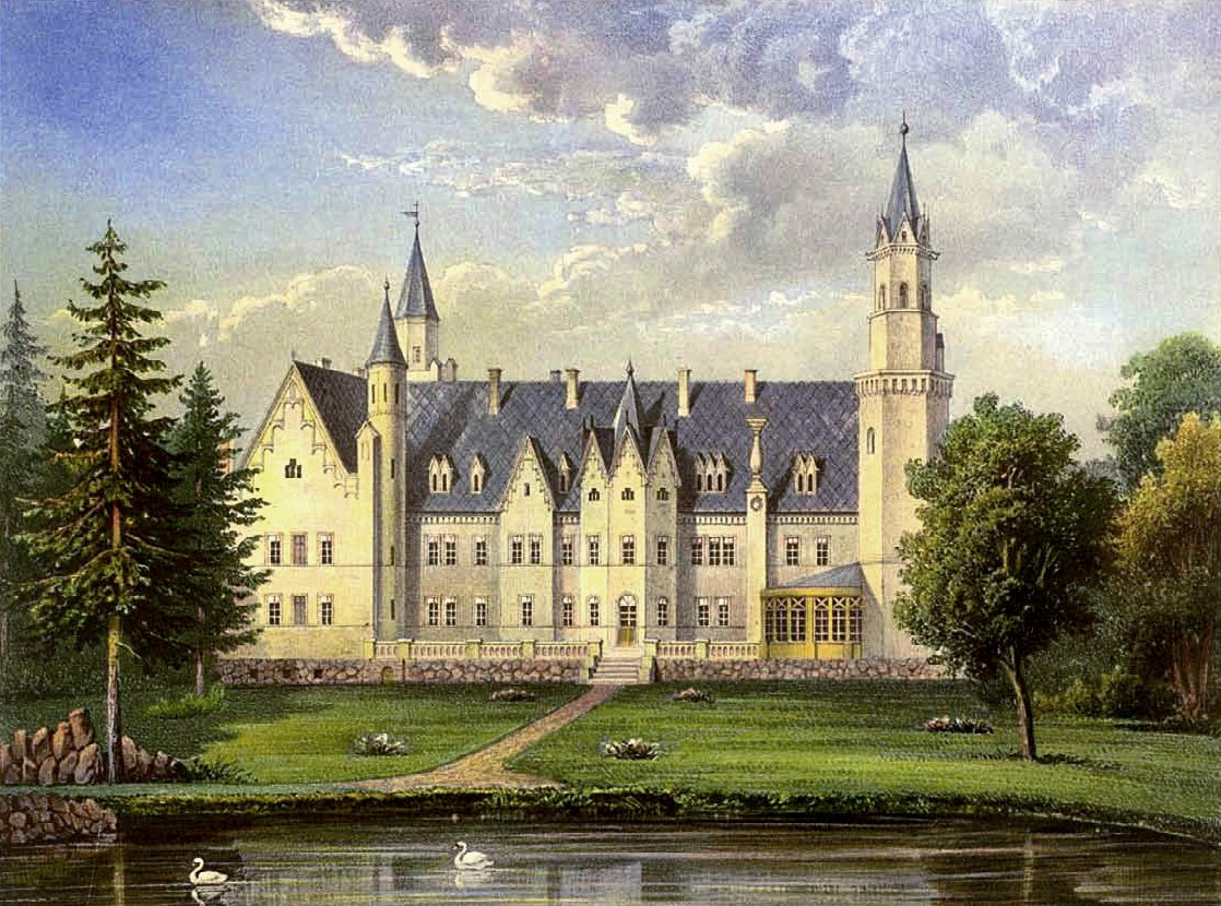 Schloss Kartlow, Kreis Demmin